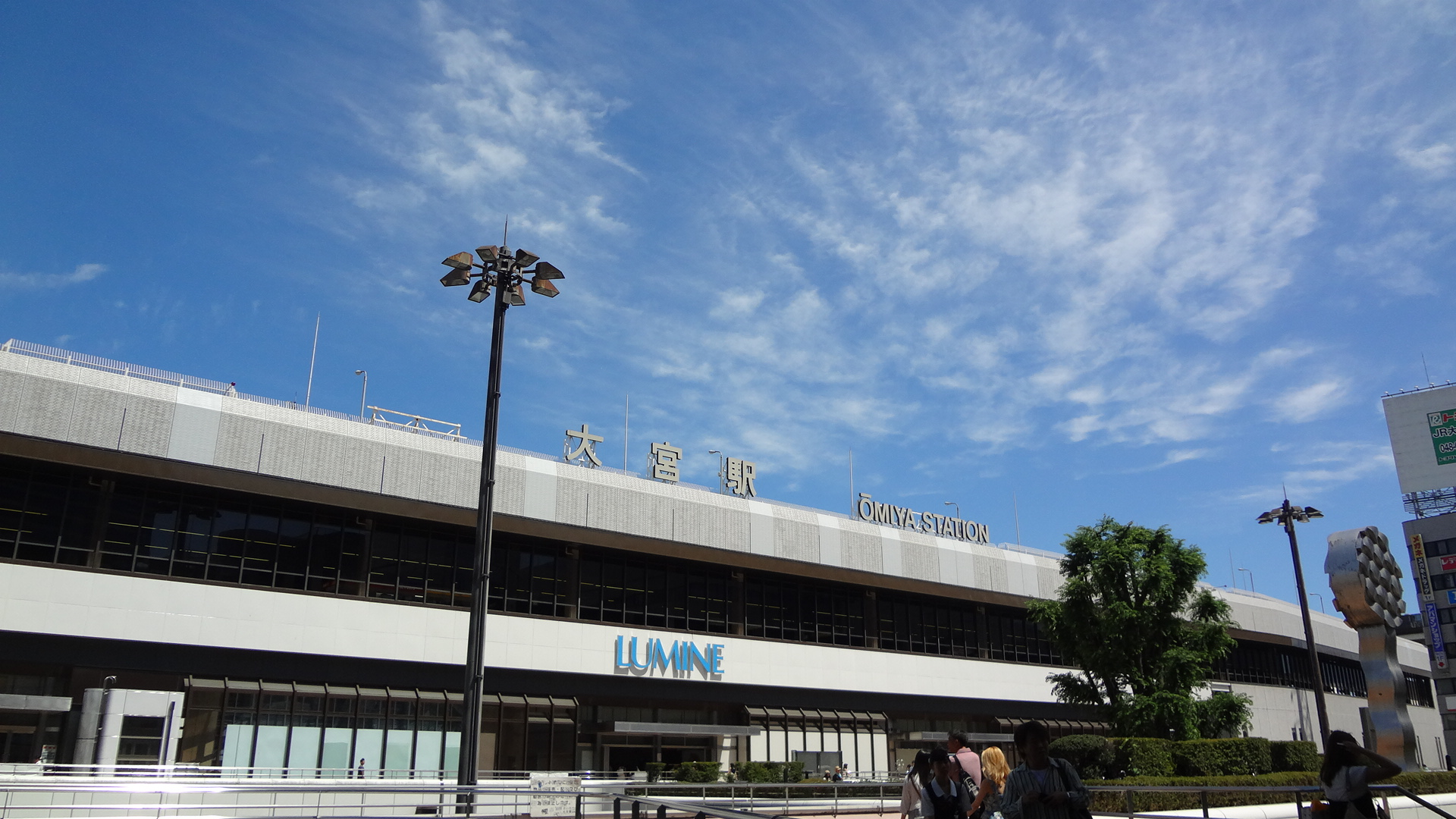 埼玉県さいたま市大宮区にあるJR大宮駅 西口 2014年8月11日撮影